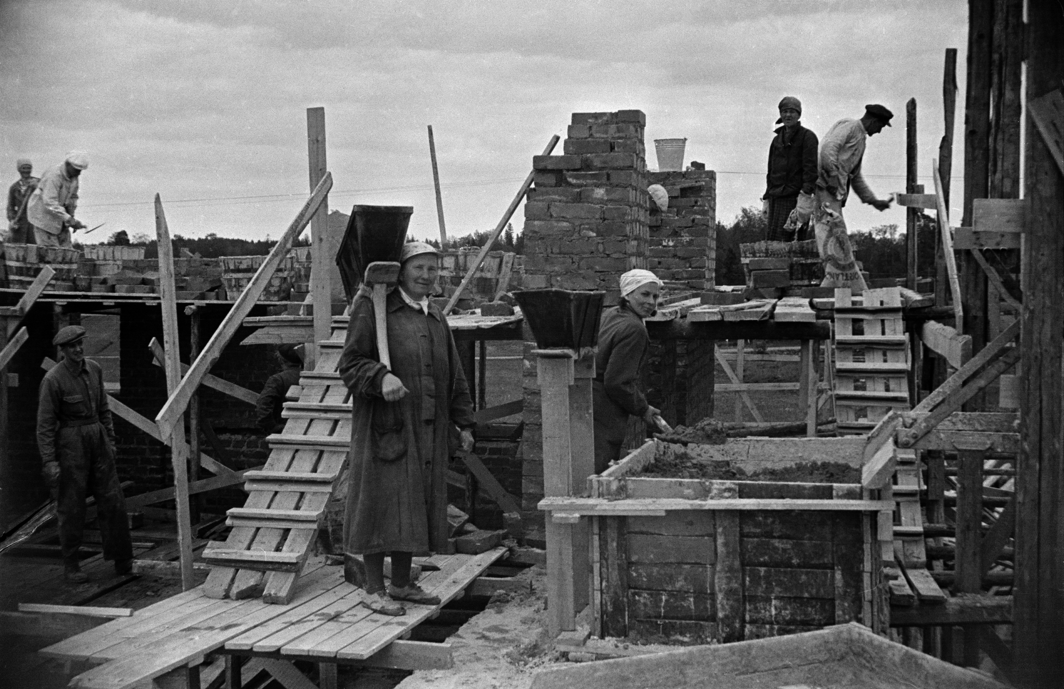 Miehiä ja naisia tekemässä muuraustöitä rakennustyömaalla Helsingissä, mahdollisesti Herttoniemessä.